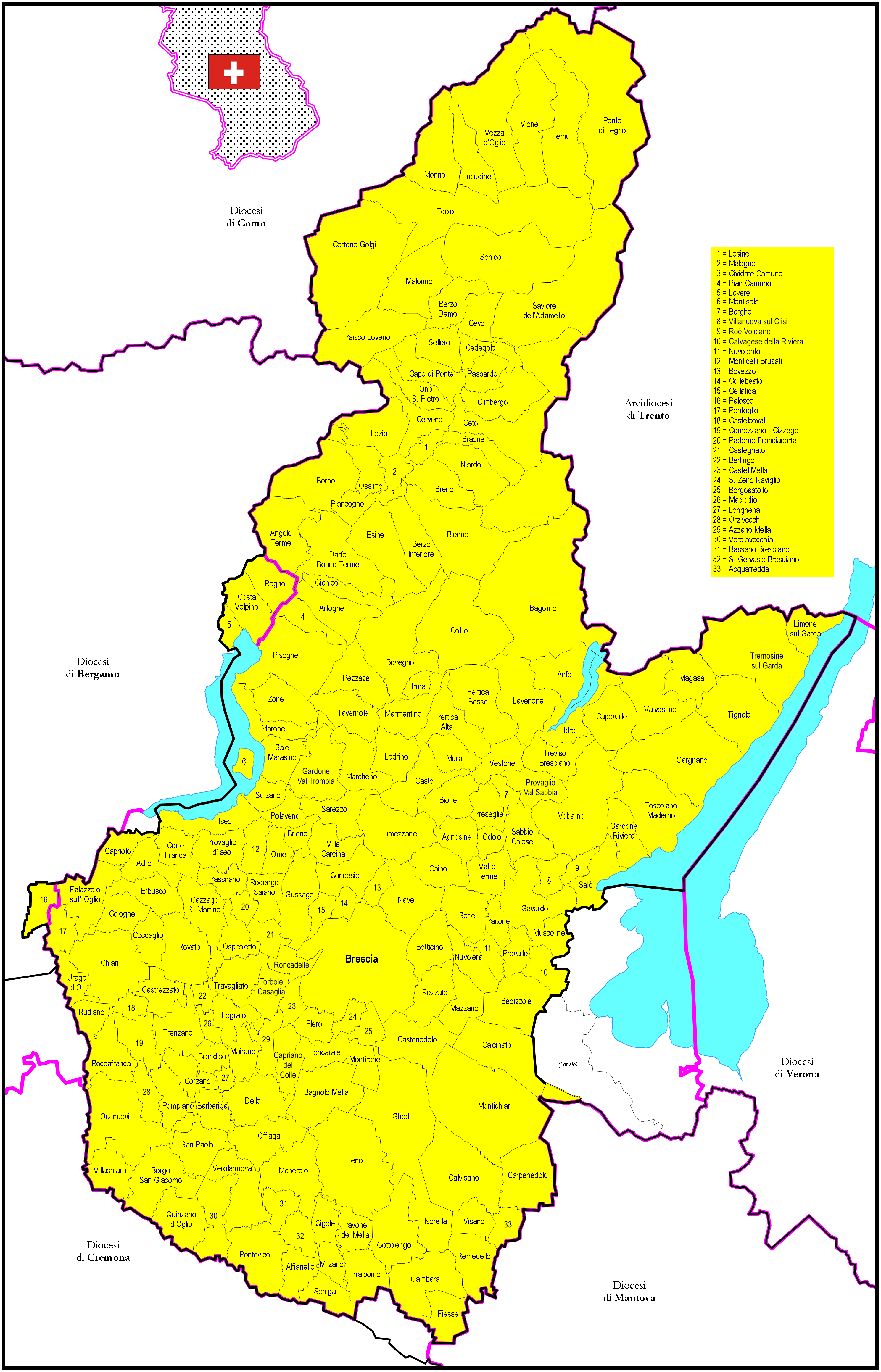 Mappa della Diocesi di Brescia